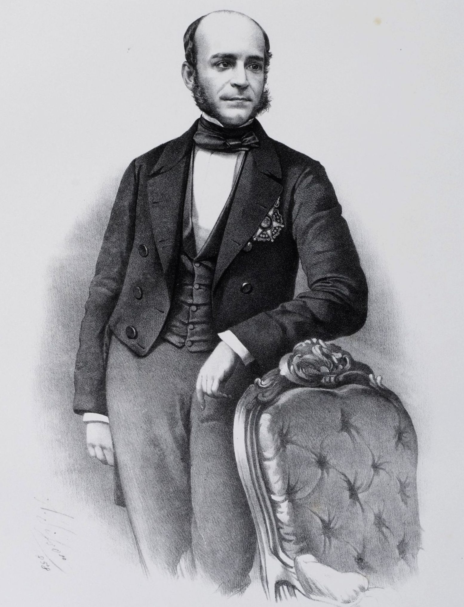 Litografia em preto e branco